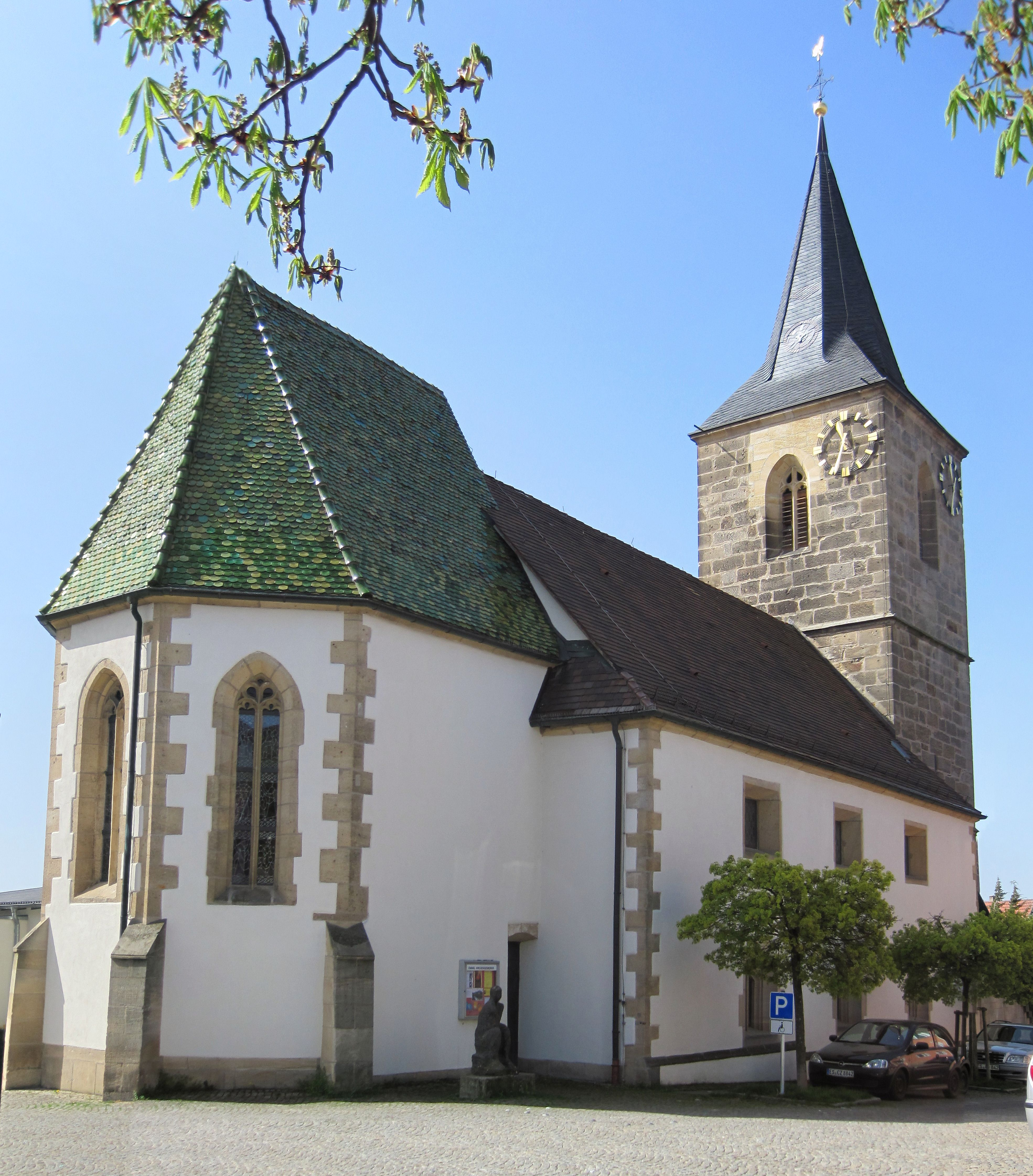 Georgskirche in Filderstadt-Bonlanden, Turm und Chor von 1472.